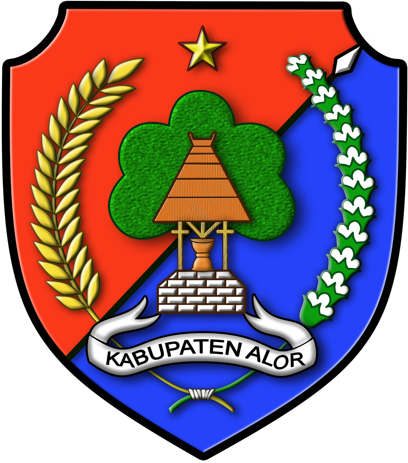 Diperoleh dari situs Departemen Dalam Negeri Republik Indonesia